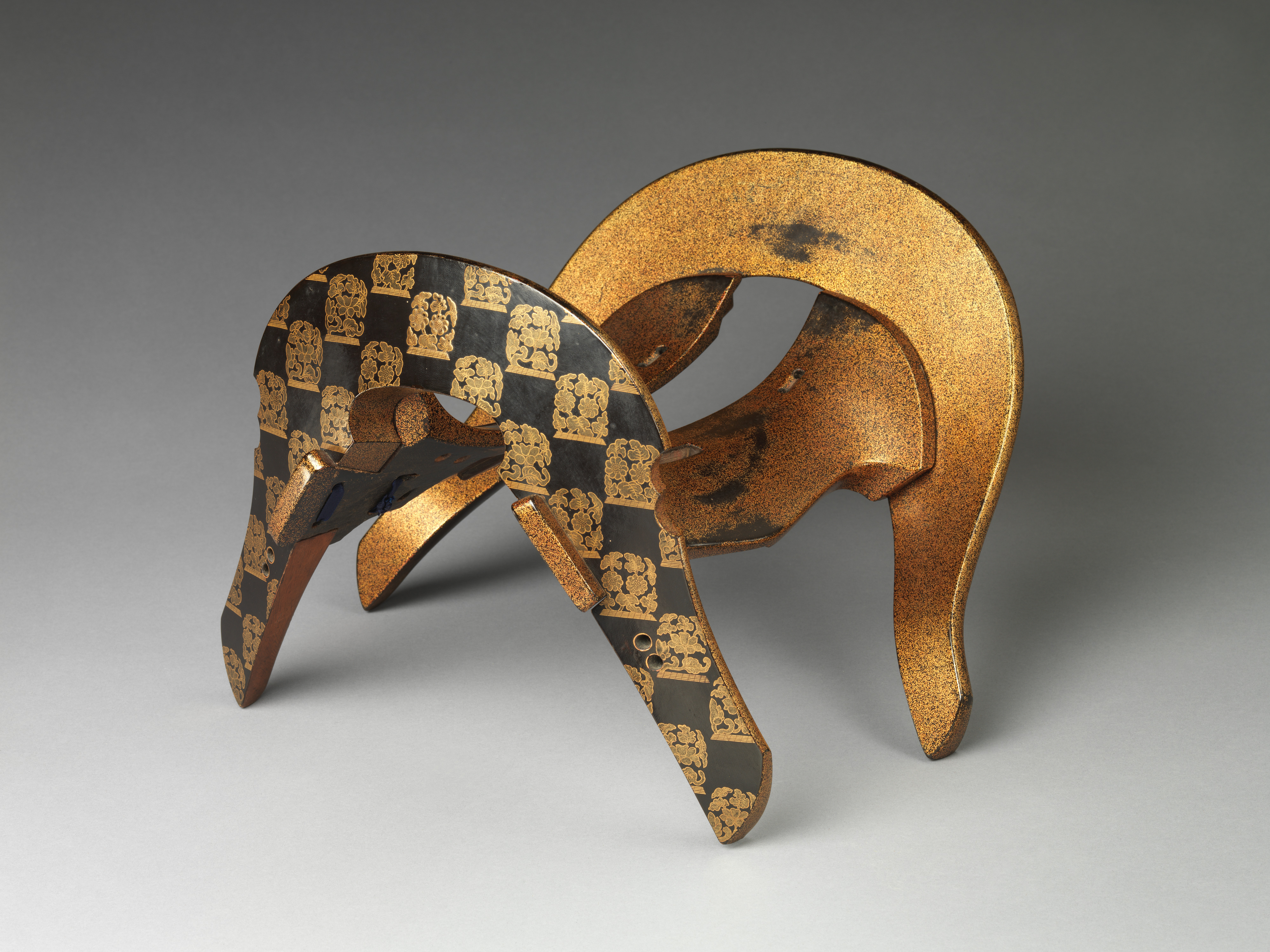 Japan; Saddle; Lacquer